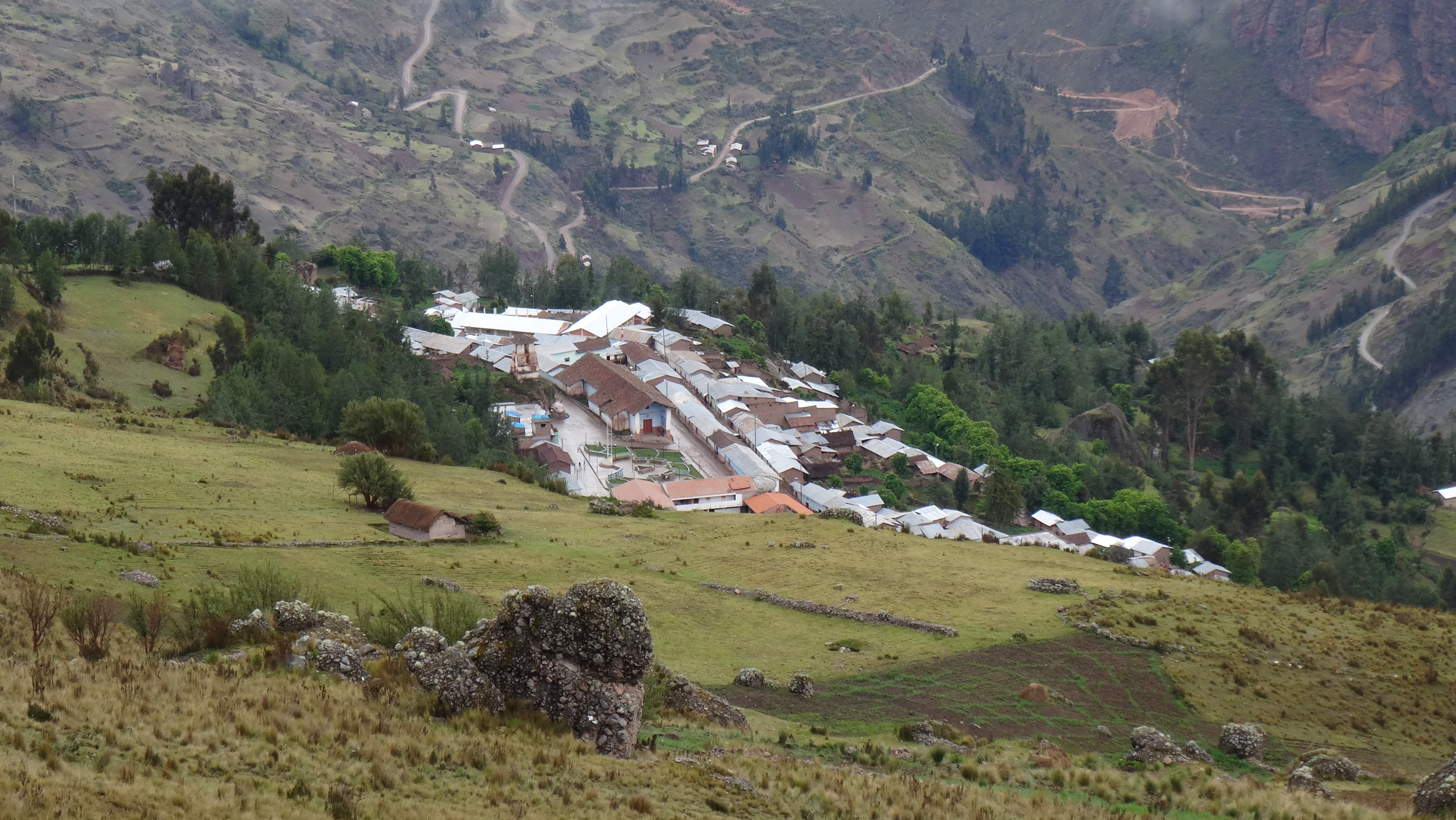 Centro poblado de Jacas Grande.